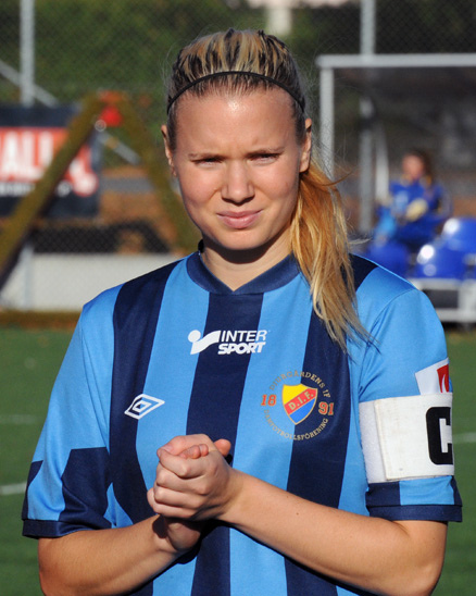 Alexandra Höglund